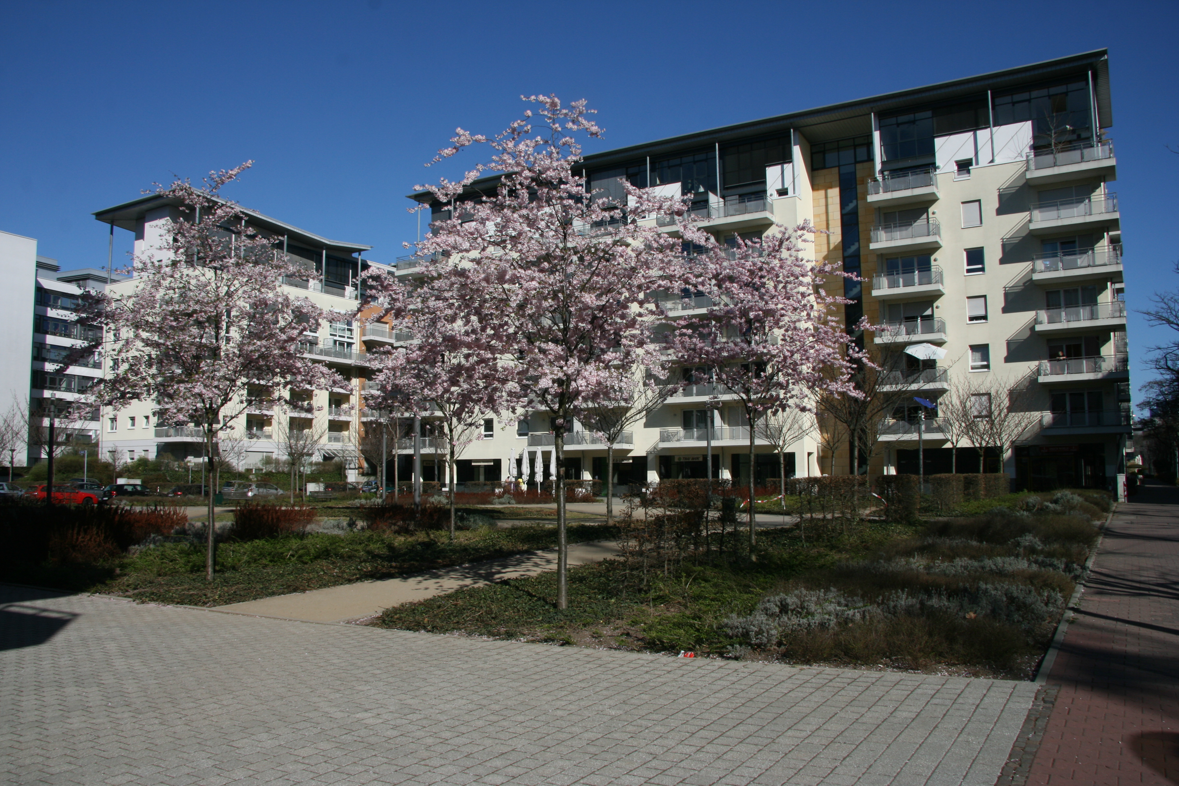 Der Celsiusplatz oder auch Celsius-Park ist ein sogenannter Pocket-Park („neudeutsch“ für Westentaschen-Park) im ehemaligen Industriegebiet von Bockenheim, der jetzigen City-West in der Voltastraße. Er erhielt seinen Namen in Anlehnung an die Namen der benachbarten Straßen wie Ohm- oder Voltastraße vom schwedischen Astronomen, Mathematiker und Physiker Anders Celsius. Zur Belebung dieses an der Voltastraße gelegenen Platzes wird seit September 2005 an jedem Mittwoch ein Wochenmarkt abgehalten. Dieser wurde ohne großen Zuspruch anfänglich mit fünf Marktständen von der städtischen HFM Managementgesellschaft für Hafen und Markt mbH betrieben. Auch die anfänglich von der benachbarten Athlon Place Stiftung (APS) als Marketing-Maßnahme veranstalteten kulturellen Veranstaltungen sollten zu einer Belebung beitragen. Hier, auf dieser historischen Parzelle, produzierte vormals die Maschinenfabrik Moenus AG über 100 Jahre u. a. Schuhmaschinen, bevor dann zunächst ein Getränkegroßhandel und dann später die Music-Hall (1983–1994) in der ehemaligen Produktionshalle eine Großdisko betrieb.